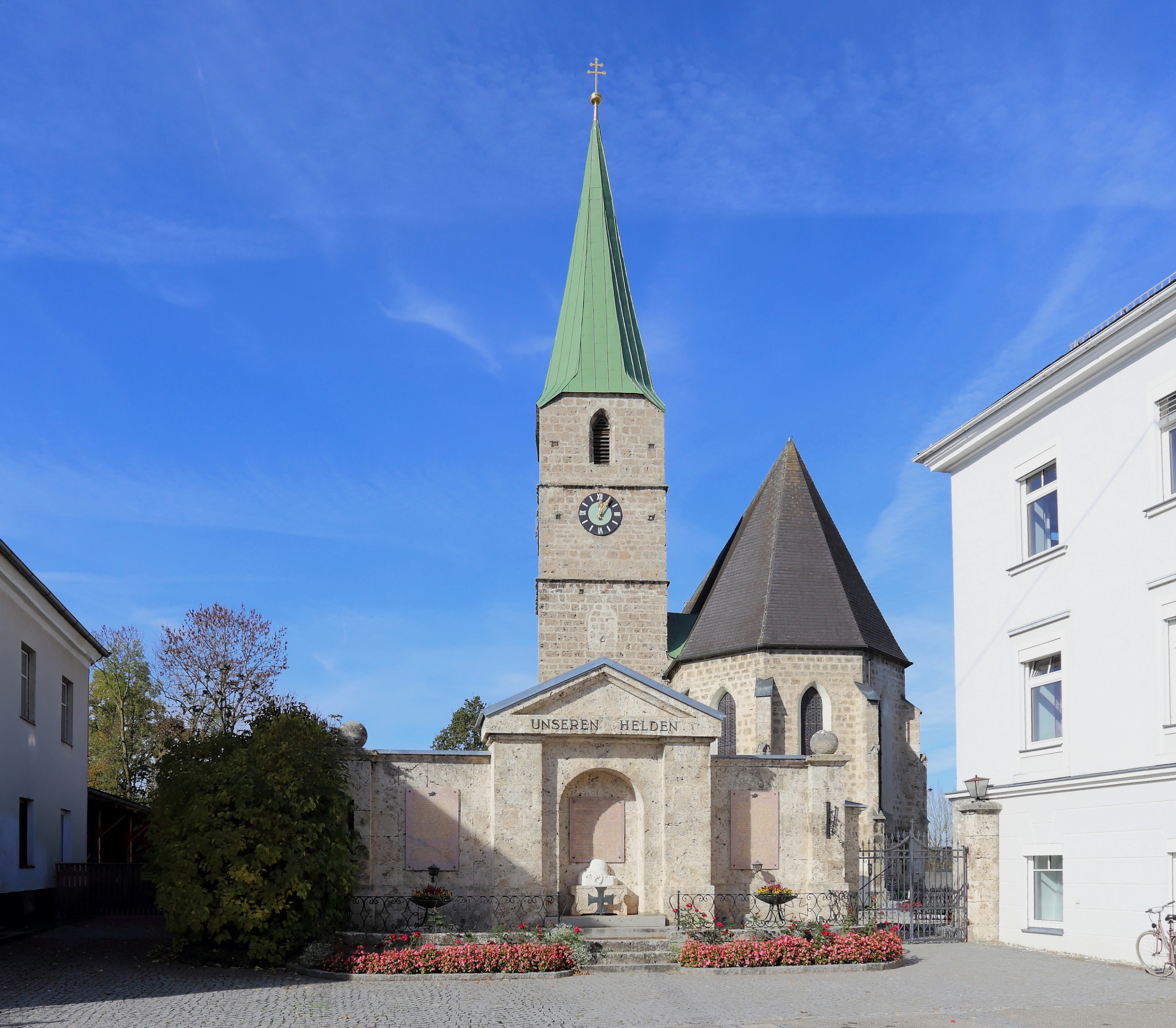 Südostansicht der katholischen Pfarrkirche hl. Georg in der oberösterreichischen Gemeinde St. Georgen bei Obernberg am Inn. Ein Tuffquaderbau mit einem einschiffigen Langhaus. Der zweijochige Chor mit 3/8-Schluß ist leicht eingezogen.